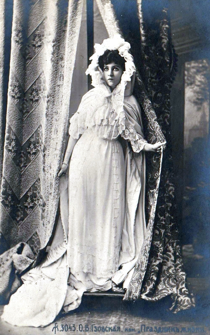 О.В. Гзовская. ком. "Праздник жизни". Дореволюционная открытка.